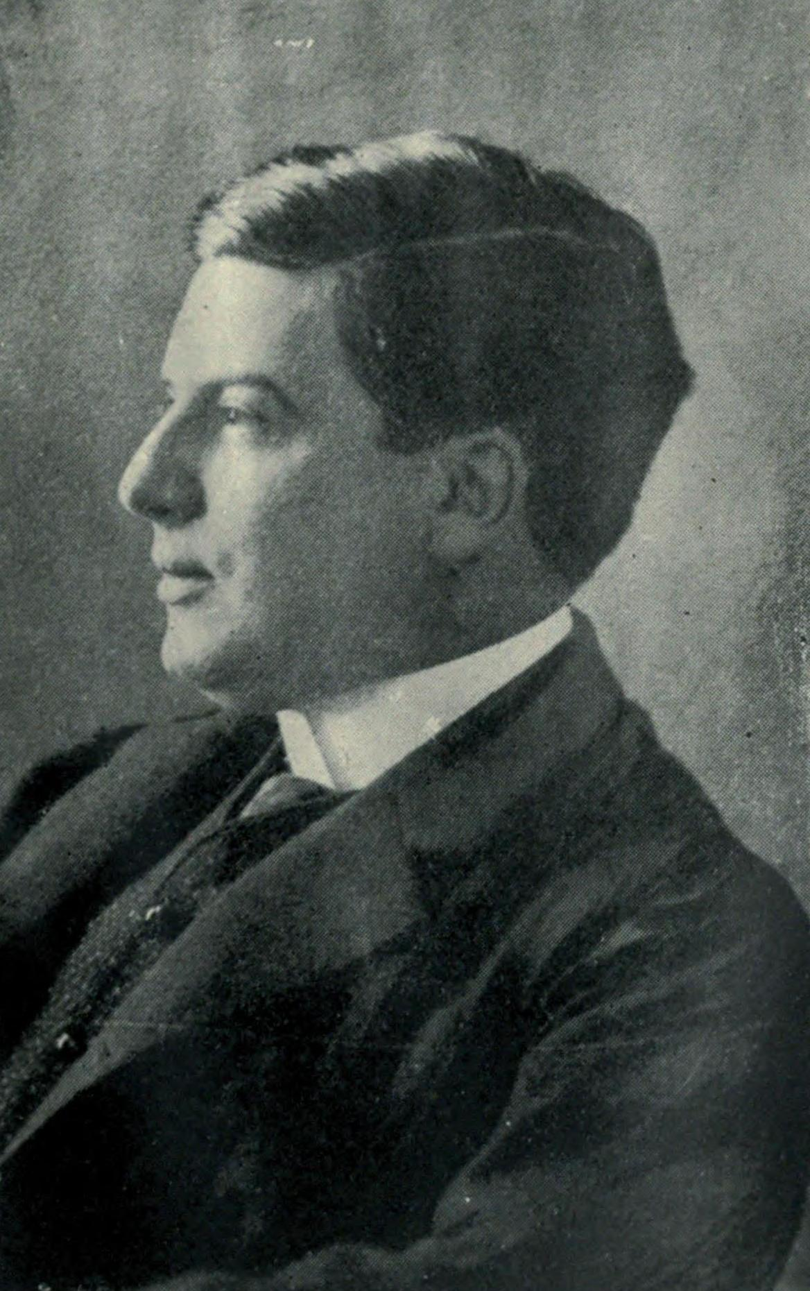 Joaquín Díaz Garcés (Santiago de Chile, 15 de septiembre de 1877 - Santiago, 1921) fue un escritor y periodista chileno. Escribió múltiples columnas y artículos de prensa, con un estilo costumbrista, mordaz, de lenguaje popular firmados con el seudónimo de Ángel Pino. Fundó en 1913 la revista Pacífico Magazine y participó en la fundación de los diarios El Mercurio de Santiago en 1900 y Las Últimas Noticias. Director de la Escuela de Bellas Artes en 1916, y elegido miembro de número de la Academia Chilena de la Lengua en 1917